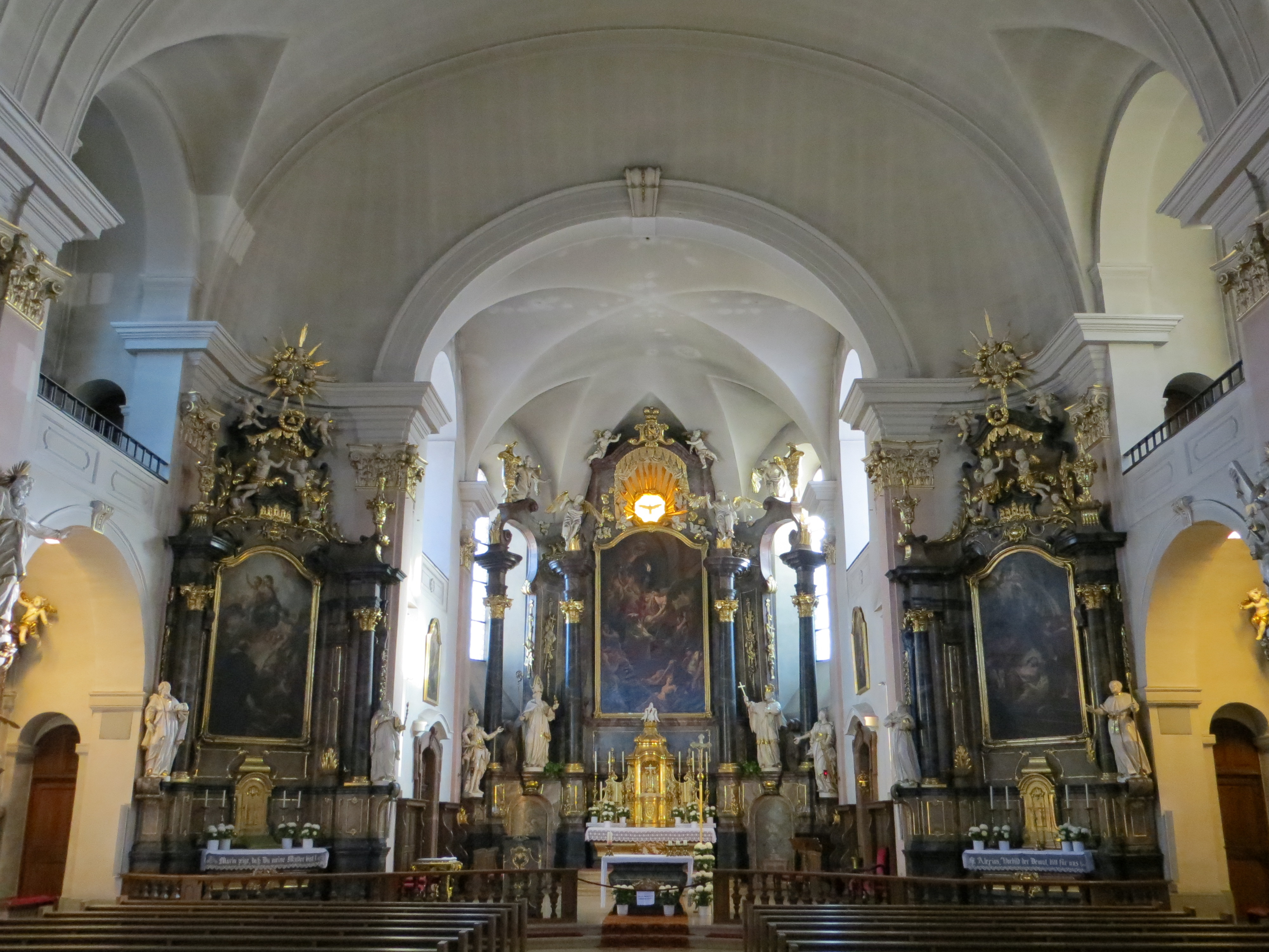 St. Alexander Chor Rastatt